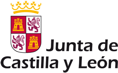 Emblema institucional de la Junta de Castilla y León